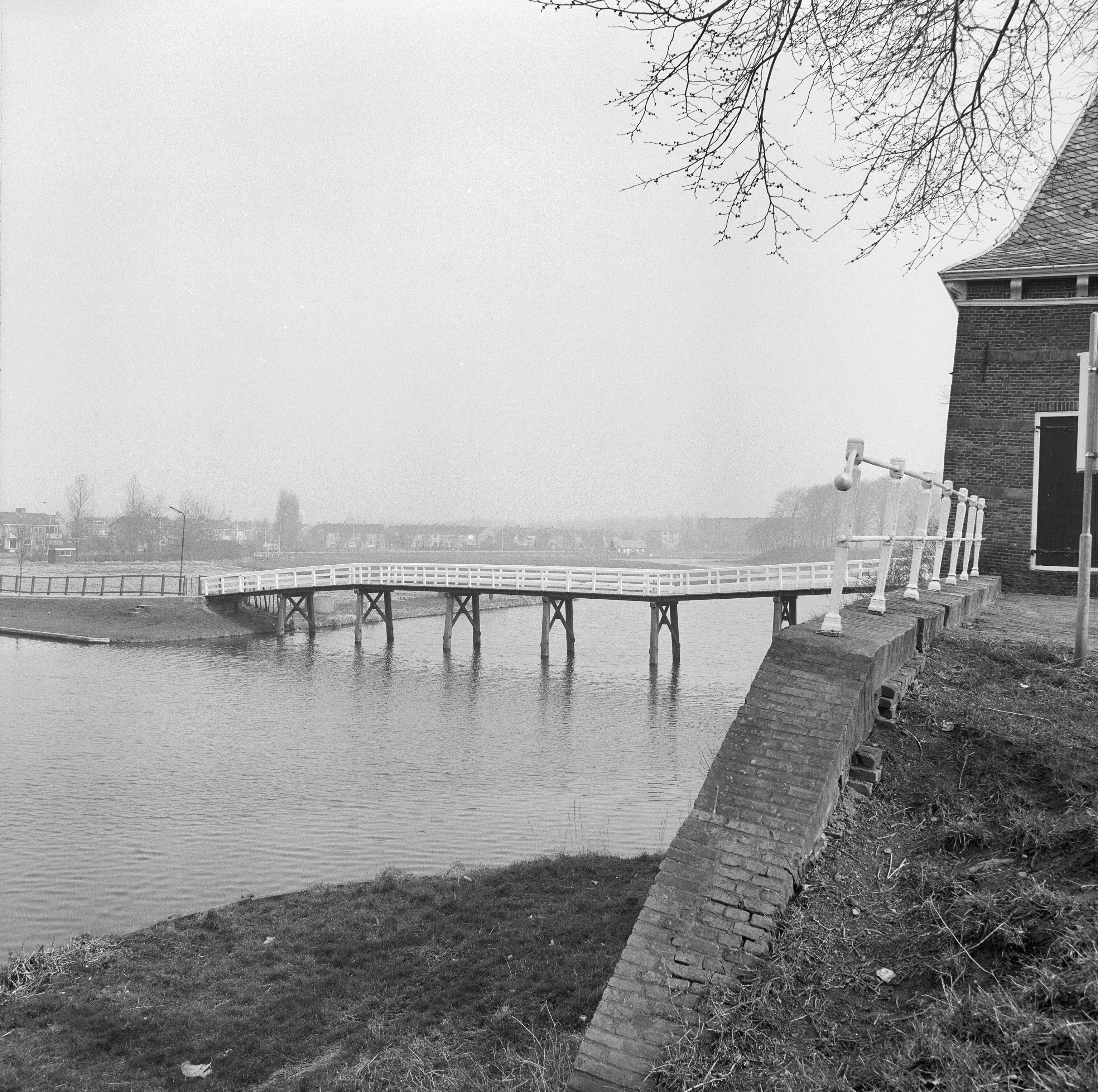 Plattegronden en Overzichten: Overzicht, vesting brug over vestinggracht bij Oude Gouwsboom